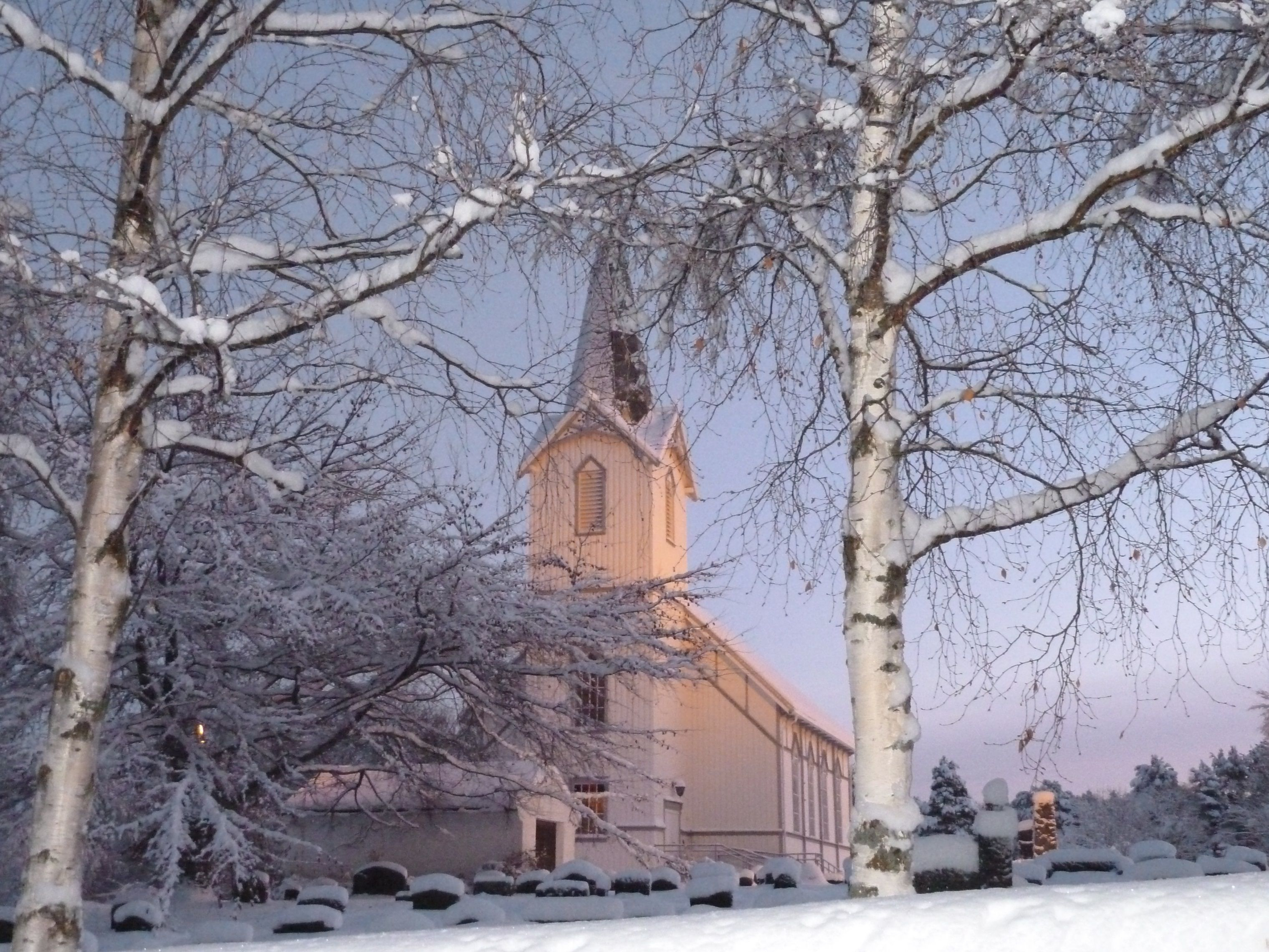 Lånke kirke i Stjørdal kommune. Foto: Kristin Bodsberg/Riksantikvaren.